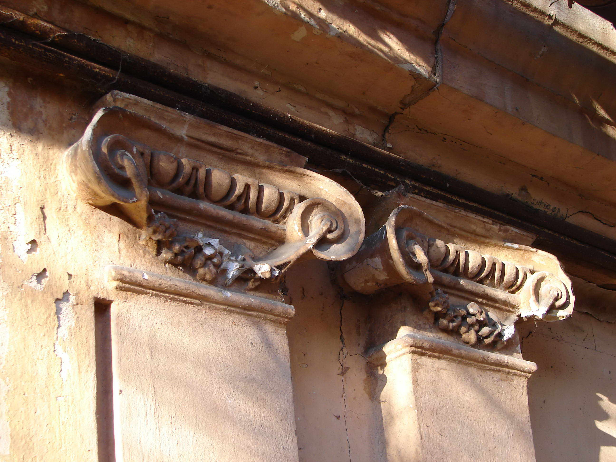 Zbytky původního klasicistního štuku nacházející se v nejzápadnějším traktu